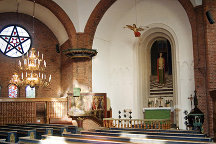 Interiör, Snöstorps kyrka. Foto: A-L Bengtsson